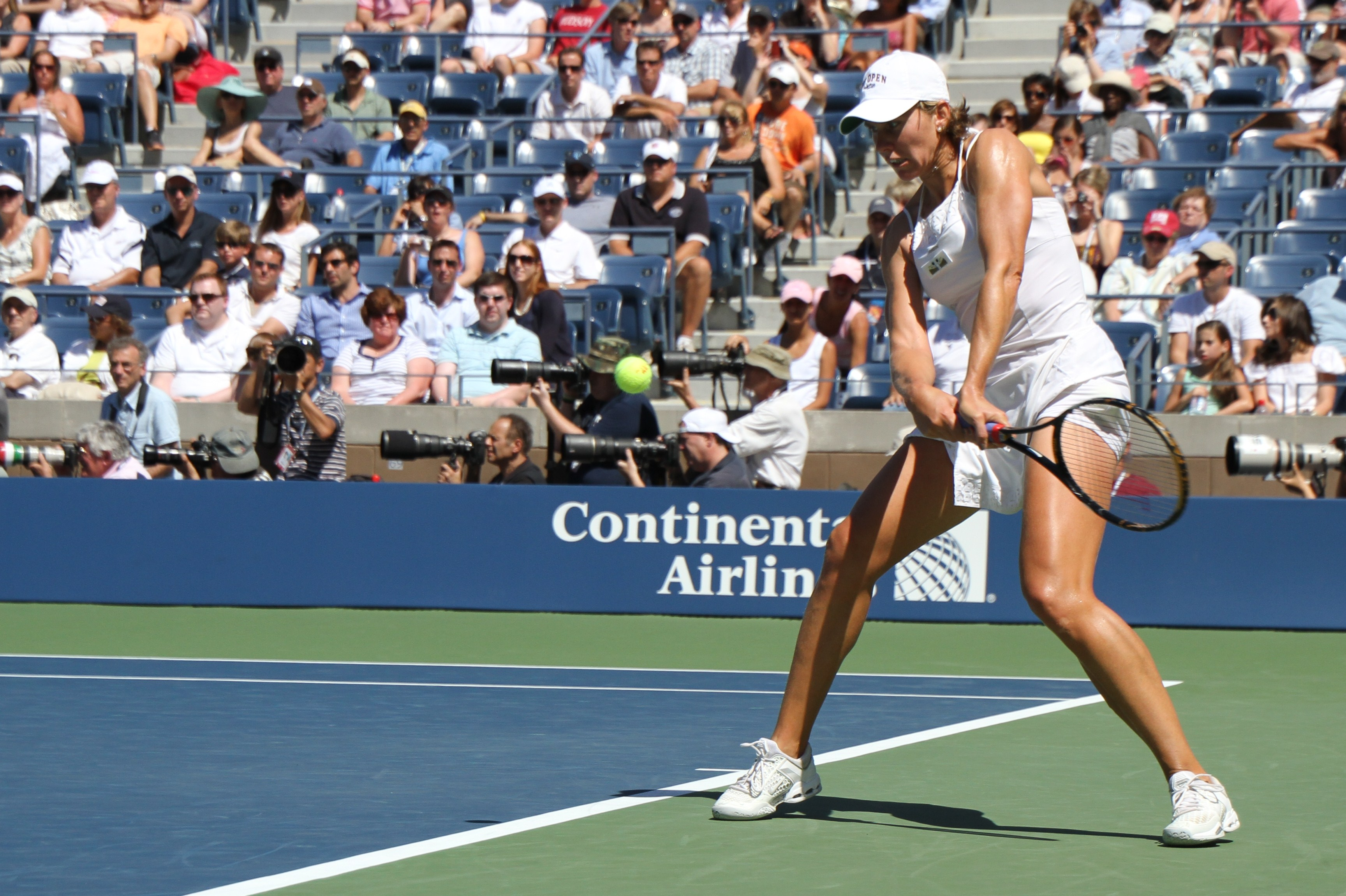 Greta Arn